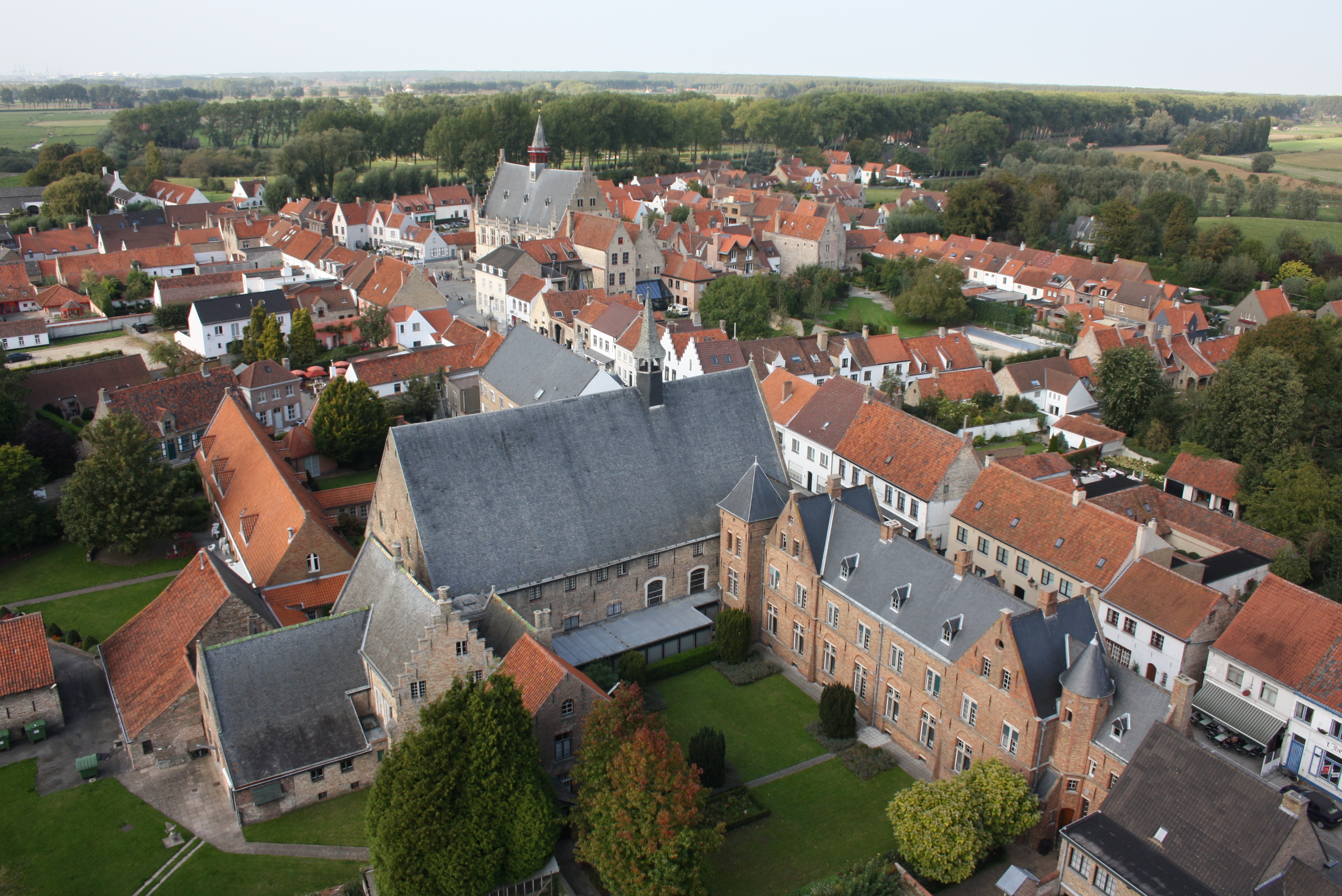 Eén van de pareltjes van Damme en tevens één van de oudste gebouwen is het Sint-Janshospitaal. Het werd voor 1249 opgericht door de Dammenaars nadat ze hiervoor toestemming gekregen hadden van Margareta van Constantinopel. Het diende voor de opvang van zieken, armen en reizigers. Het hospitaal haalde haar inkomsten uit een belasting die geheven werd op de invoer van wijn. Ten tijde van de Spaanse overheersing, deed de kapel van het hospitaal dienst als gebedshuis voor de in Damme gestationeerde soldaten. Vandaag de dag is er een bejaardentehuis in gevestigd.